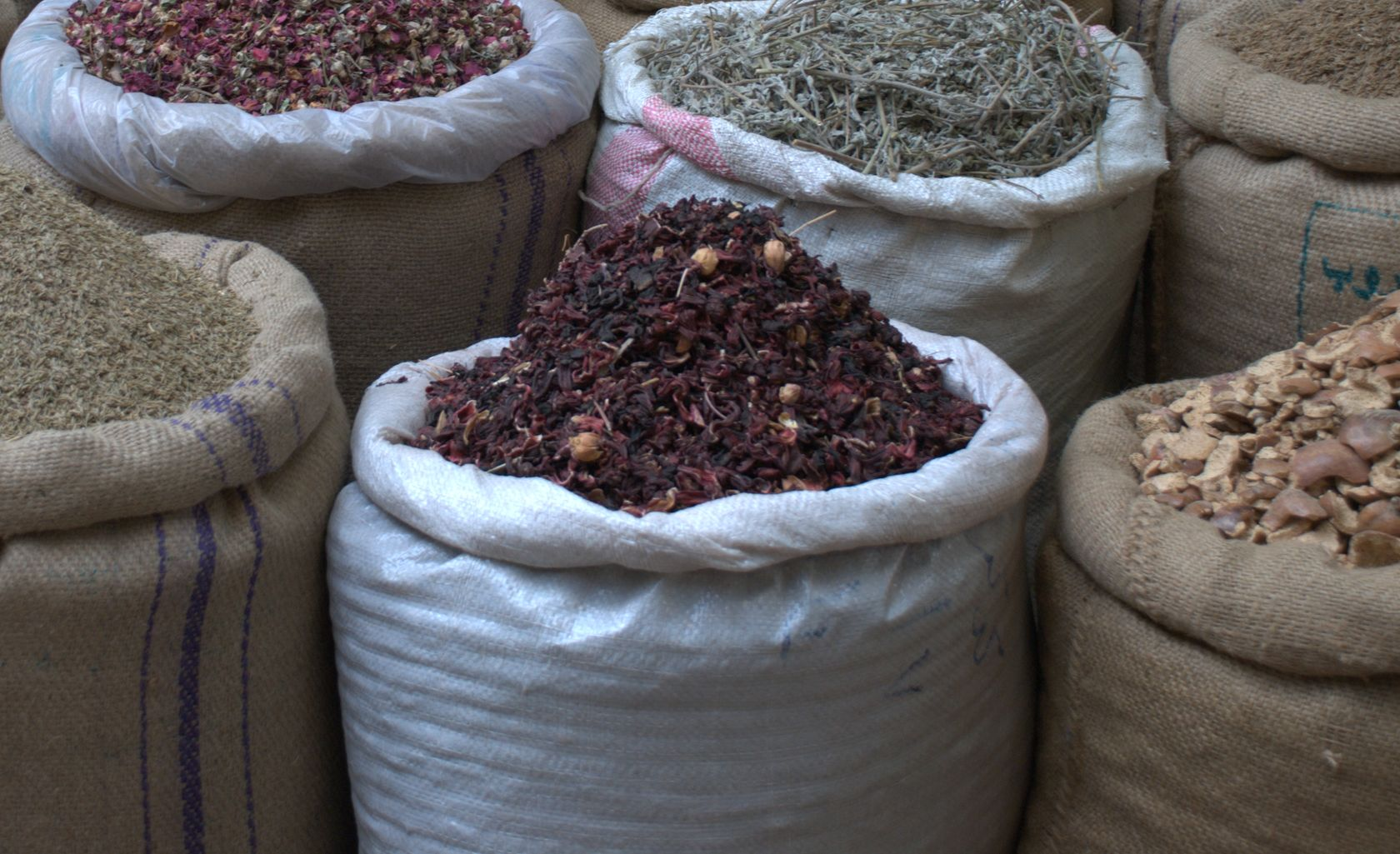 Karkadeh, spice market in Cairo